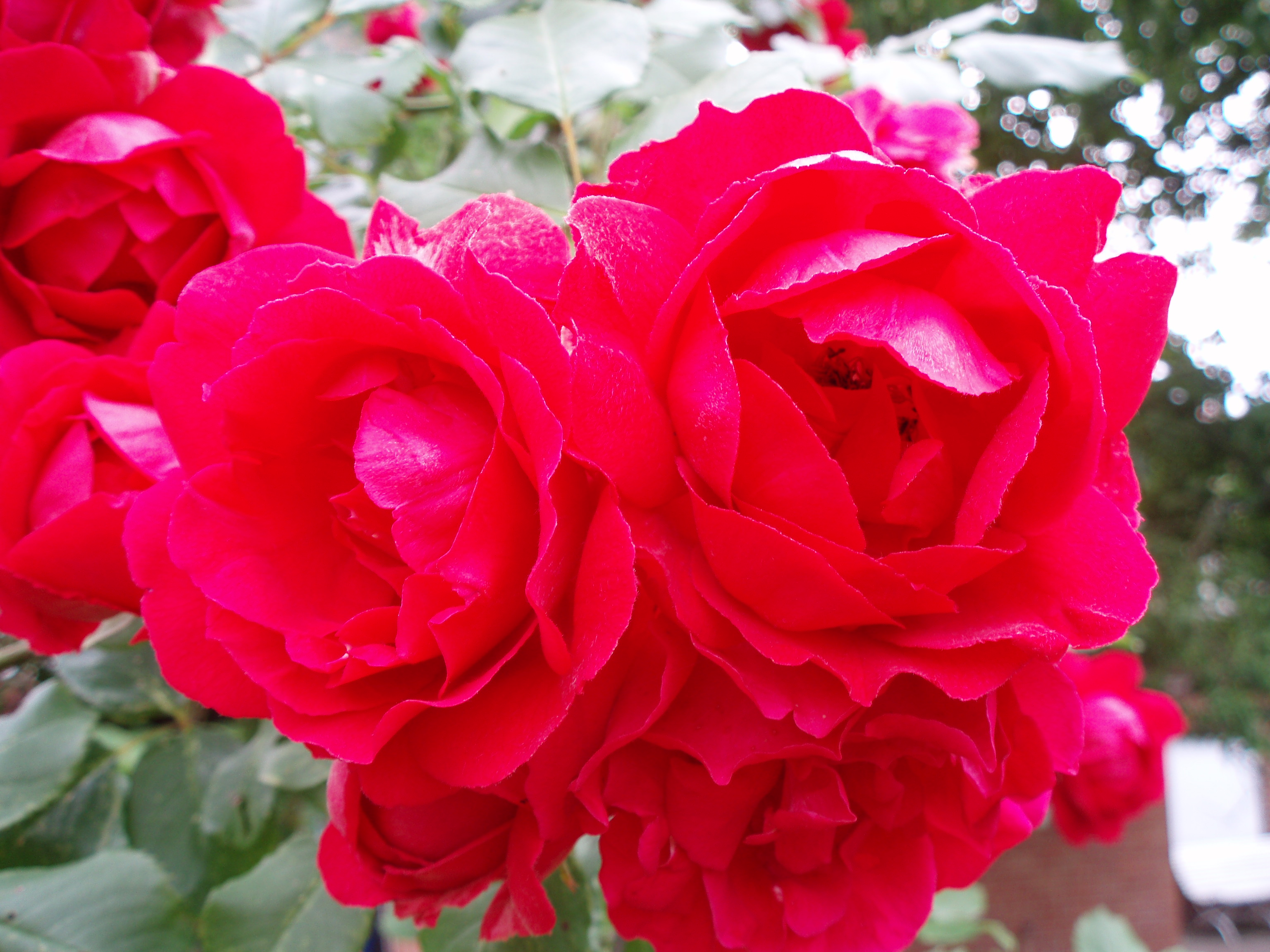 Rosenblüte